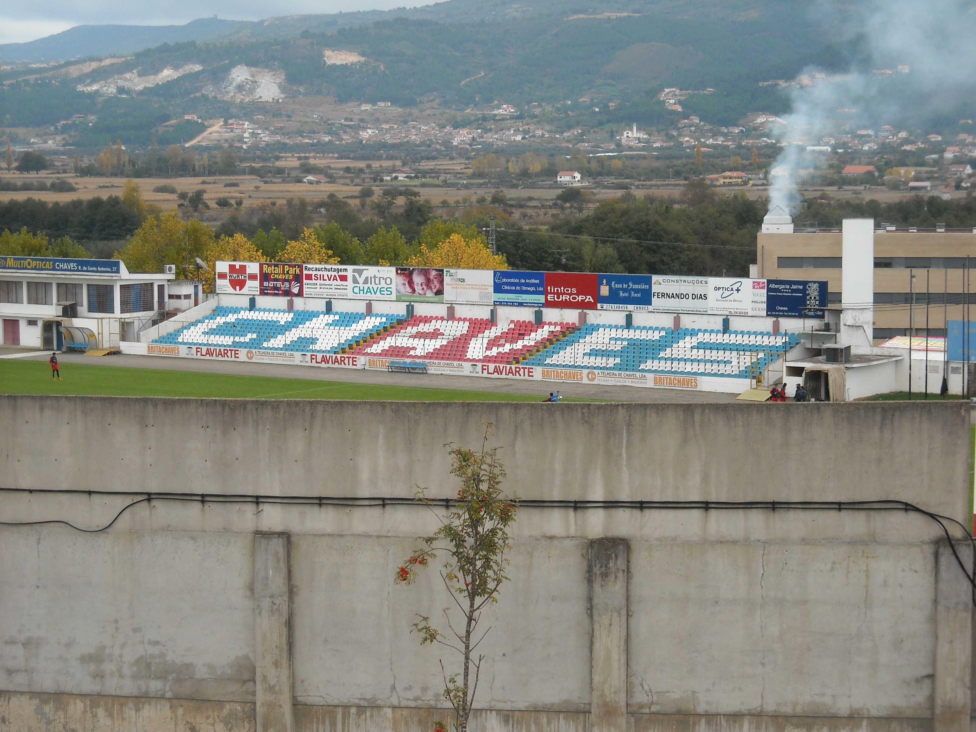 Chaves, Portugal, noviembre 2008 Chaves, Portugal, noviembre 2008